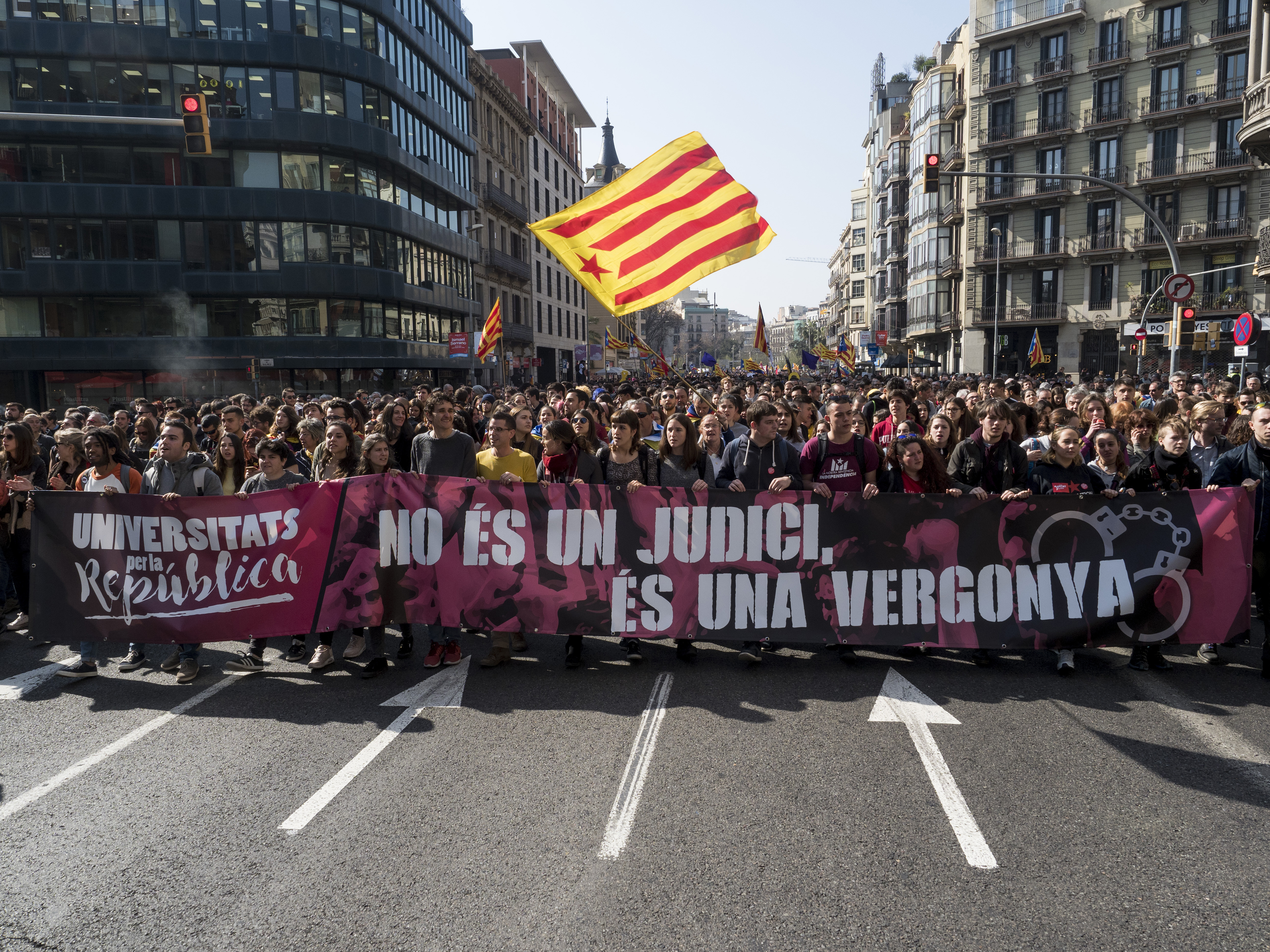 Vaga " 21-F: aturem el país!"